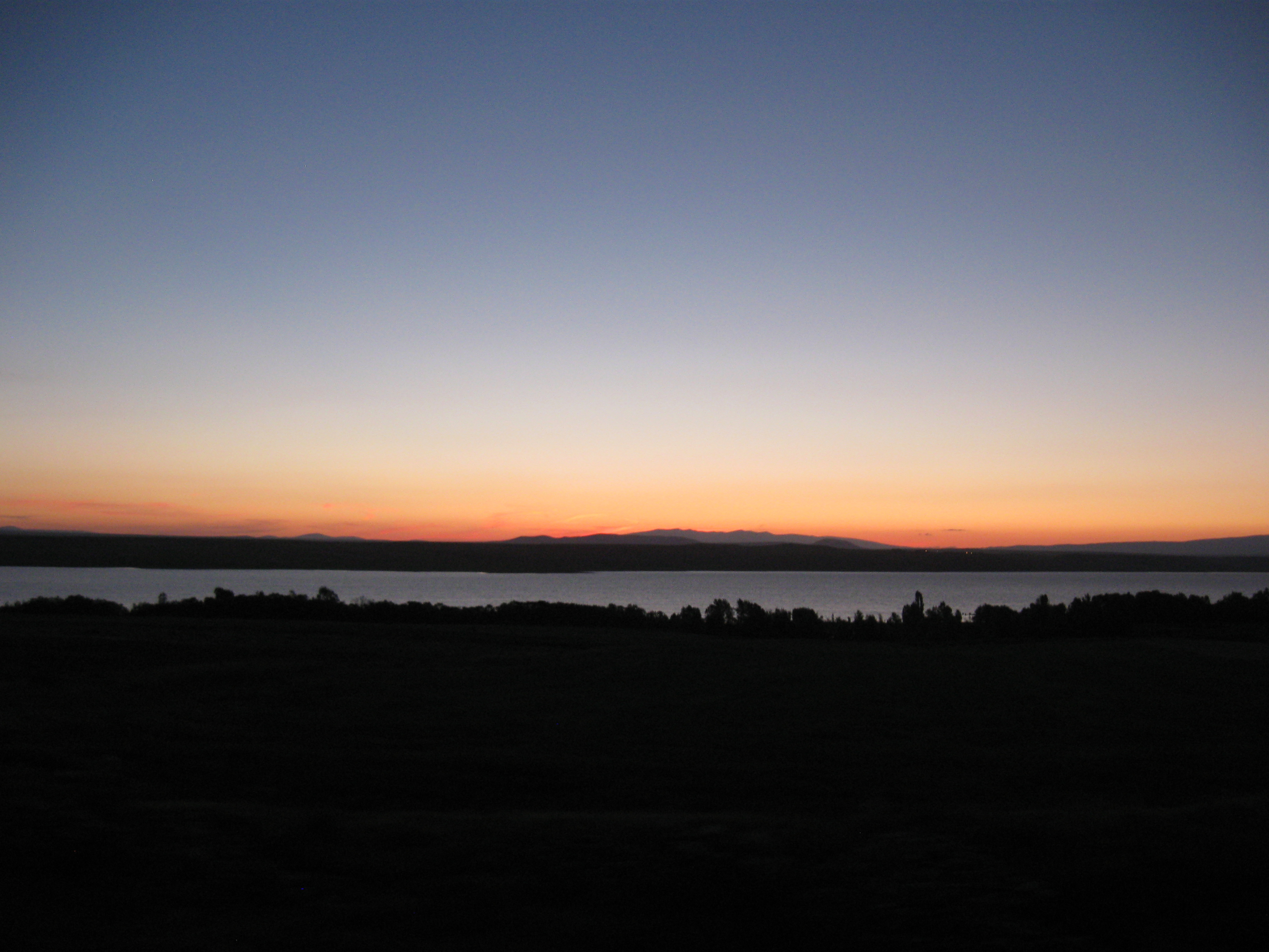 Akhurian Reservoir is a reservoir on Akhurian River between Armenia and Turkey. The reservoir has a surface area of 54 km² and a volume of 525 million cubic meters. It is one of the largest reservoirs in the Caucasus, smaller than the Mingachevir reservoir and the Shamkir reservoir in Azerbaijan.